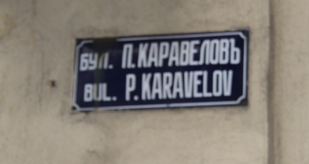 La photo montrant la trl de bulgare d'une autre façon